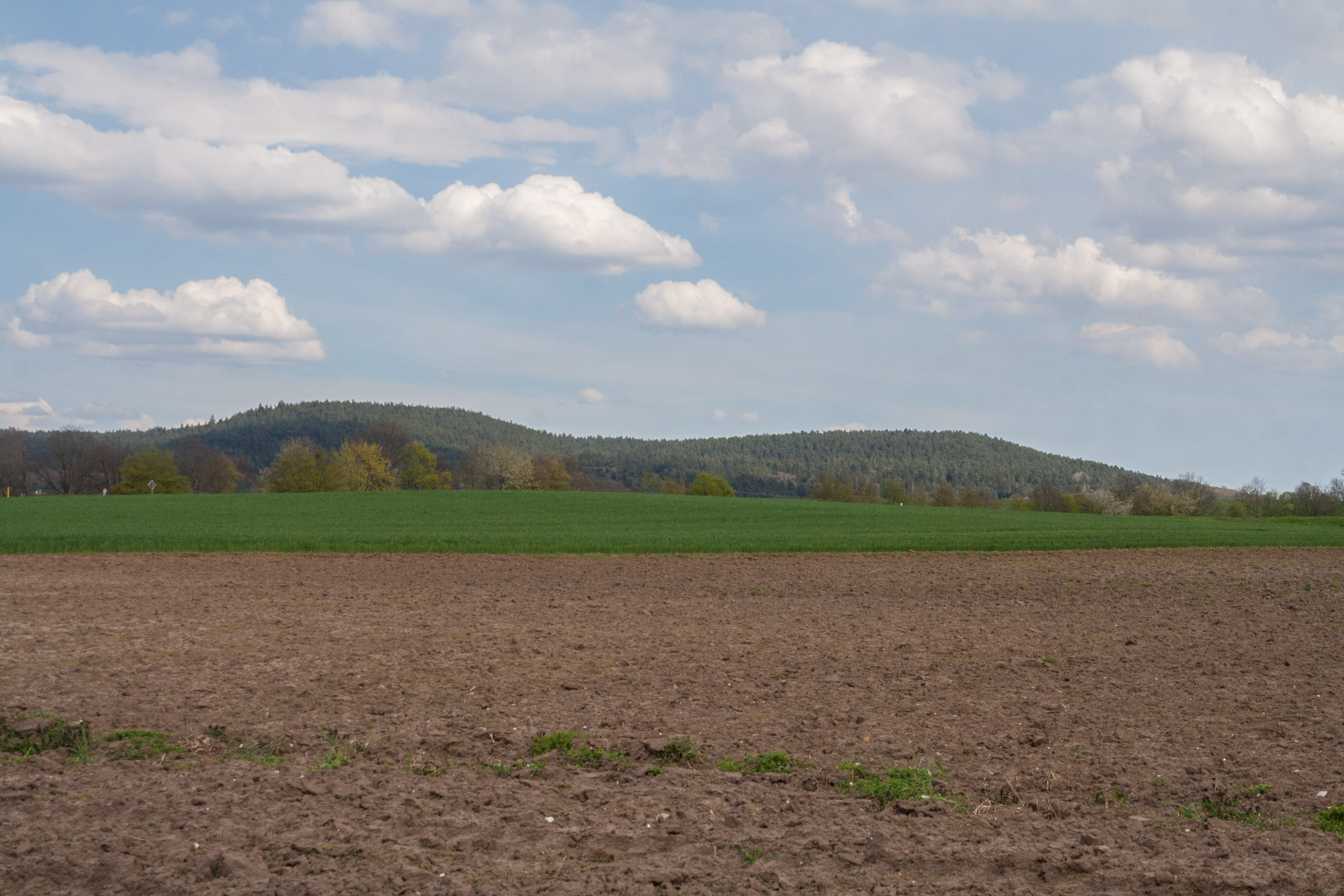 Tyrolsberg, Pulverberg, Großberg, Landschaftsschutzgebiet Tyrolsberg